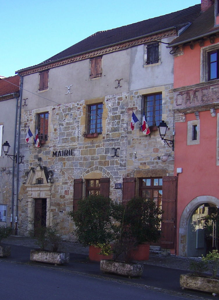 Mairie de la commune de Capdenac-le-Haut